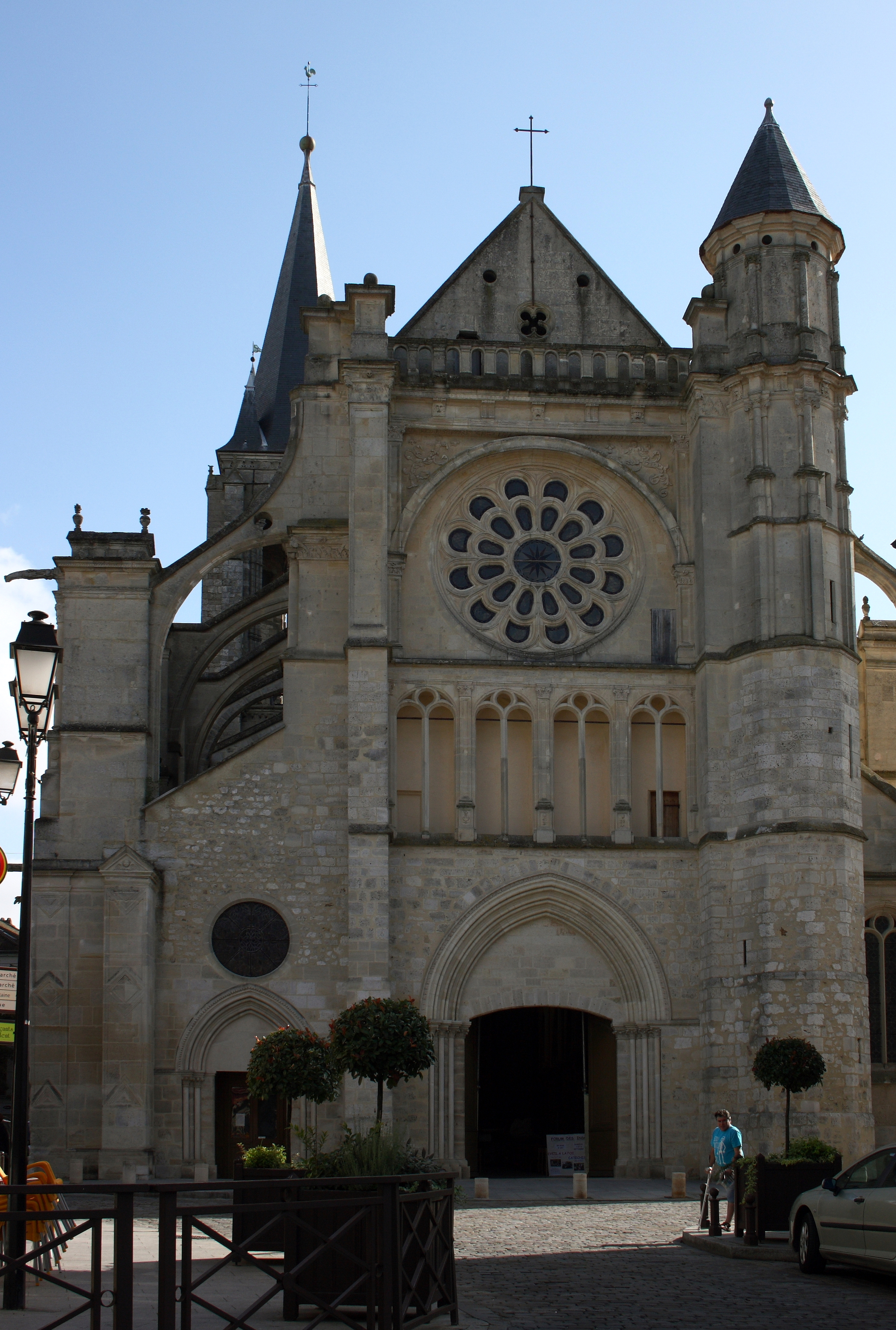 Katholische Pfarrkirche Saint-Étienne in Brie-Comte-Robert im Département Seine-et-Marne in der Region Île-de-France (Frankreich), Westfassade Object location48° 41′ 25.08″ N, 2° 36′ 30.6″ E